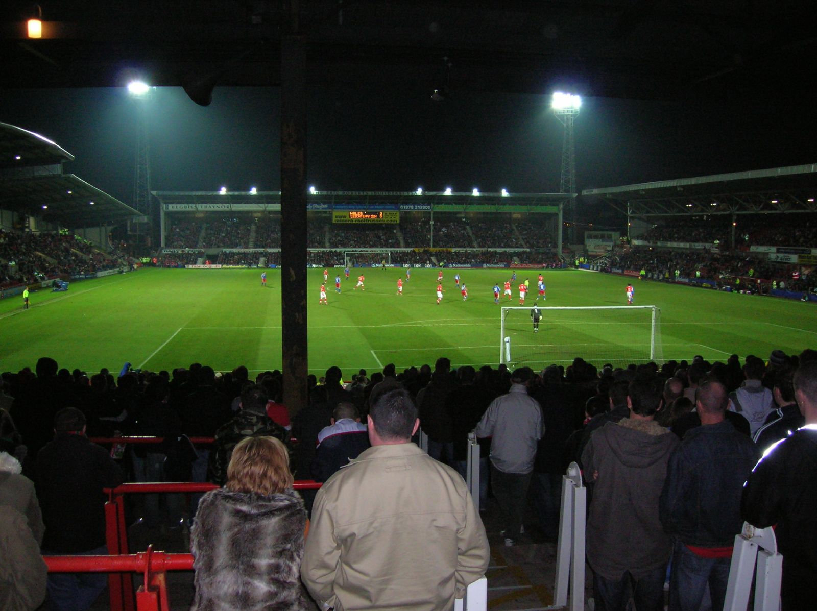 Cymru v Liechtenstein 14.11.06